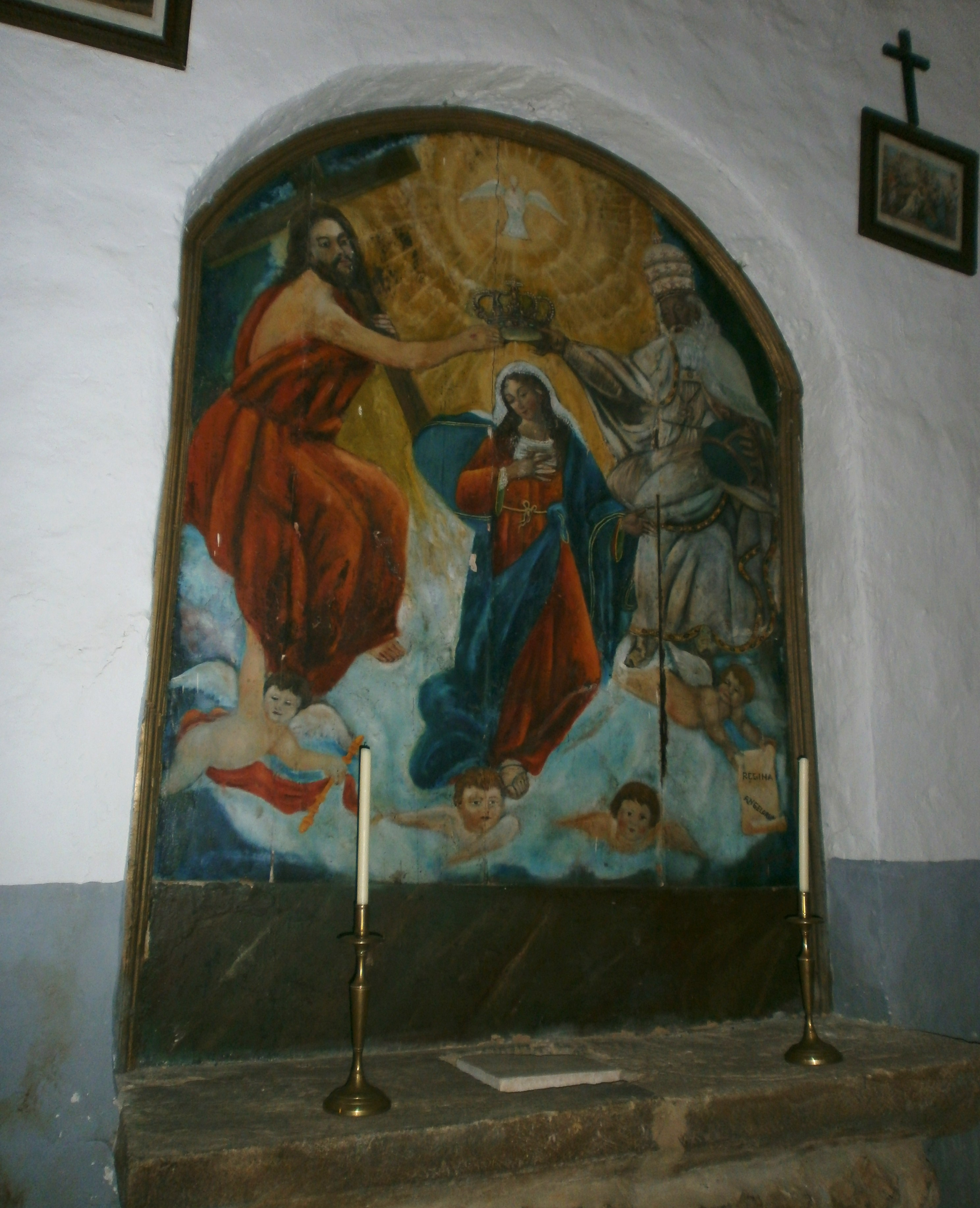 Mural de la Coronación de la Virgen en el lateral izquierdo de la nave.